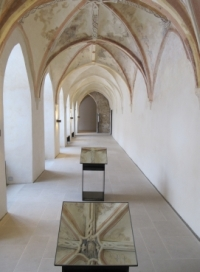 Der Kreuzgang des ehemaligen Klosters Dalheim, der heutigen Stiftung Kloster Dalheim. LWl-Landesmuseum für Klosterkultur, stammt aus dem 15. Jahrhundert. Spiegel erleichtern die Betrachtung der aufwendigen Wandmalereien.